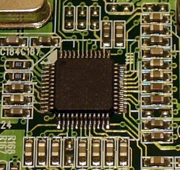 Beschaltung einer CPU mit MLCC (Multi Layer Ceramic Capacitor)